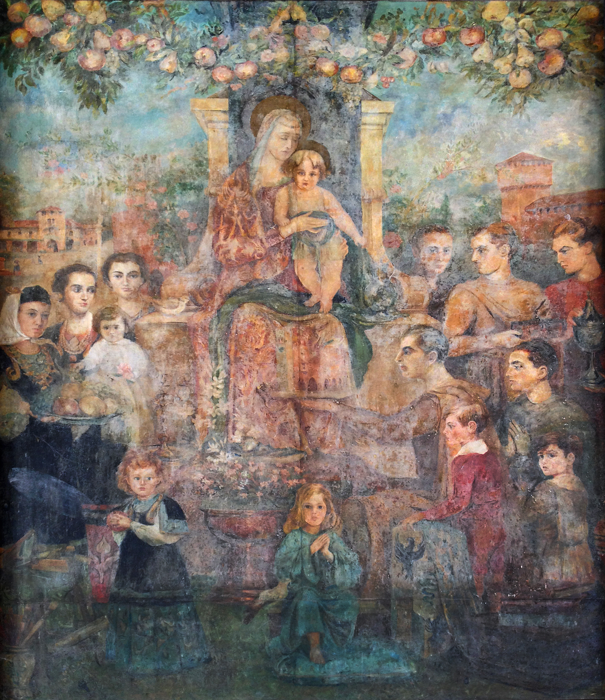 Affresco sotto i portici a Grazzano Visconti